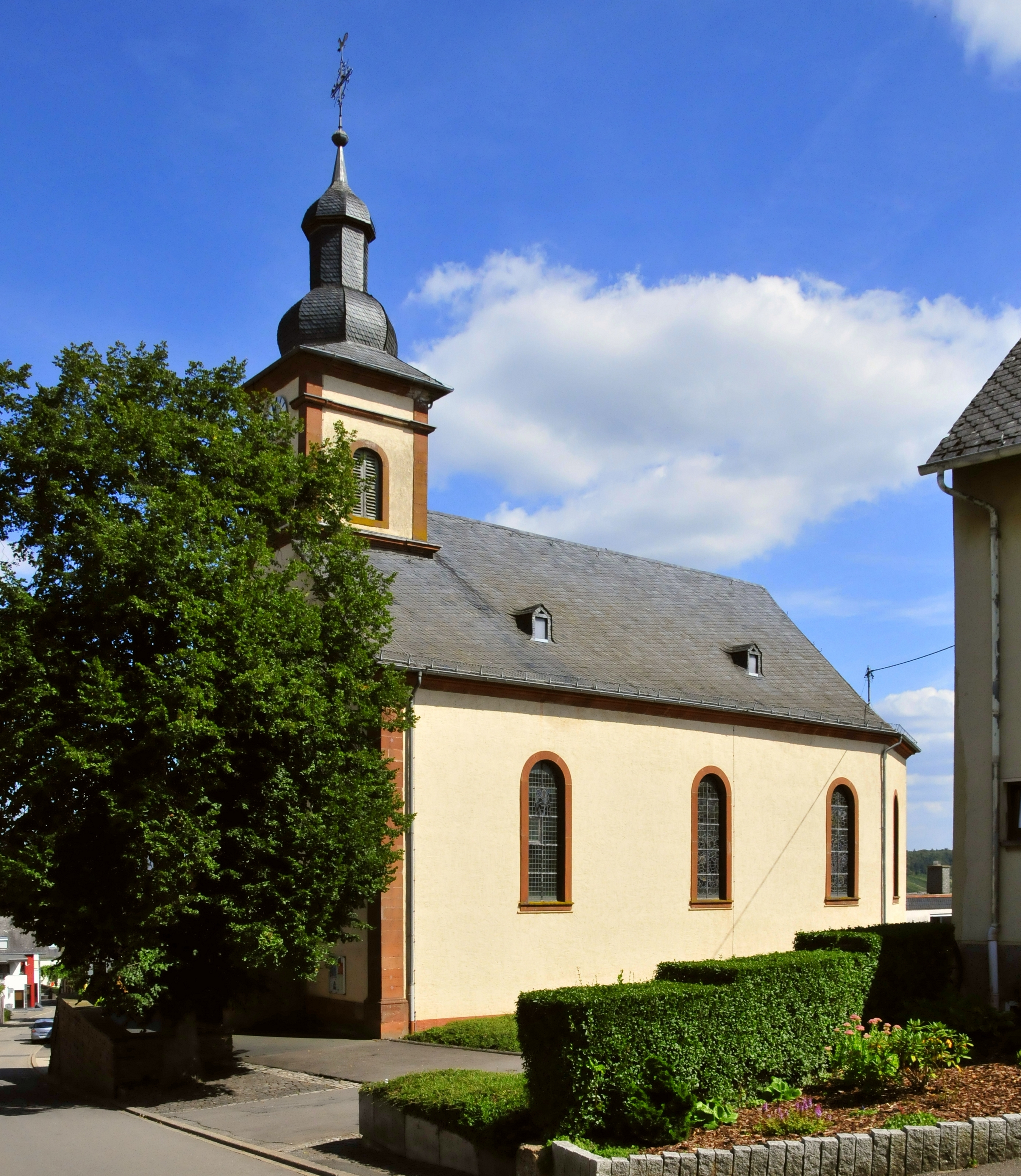 Bekond, Kirche